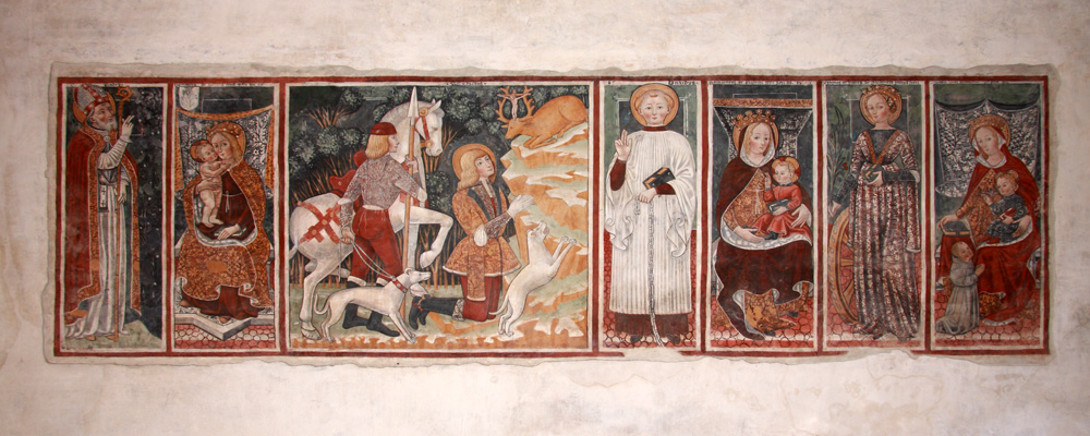 Interno dell'Oratorio di Santa Maria, Garbagna Novarese (NO): Cartiglio di affreschi della parete sinistra.